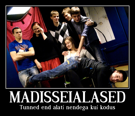 Teater NORA "Madisseia" inimesed